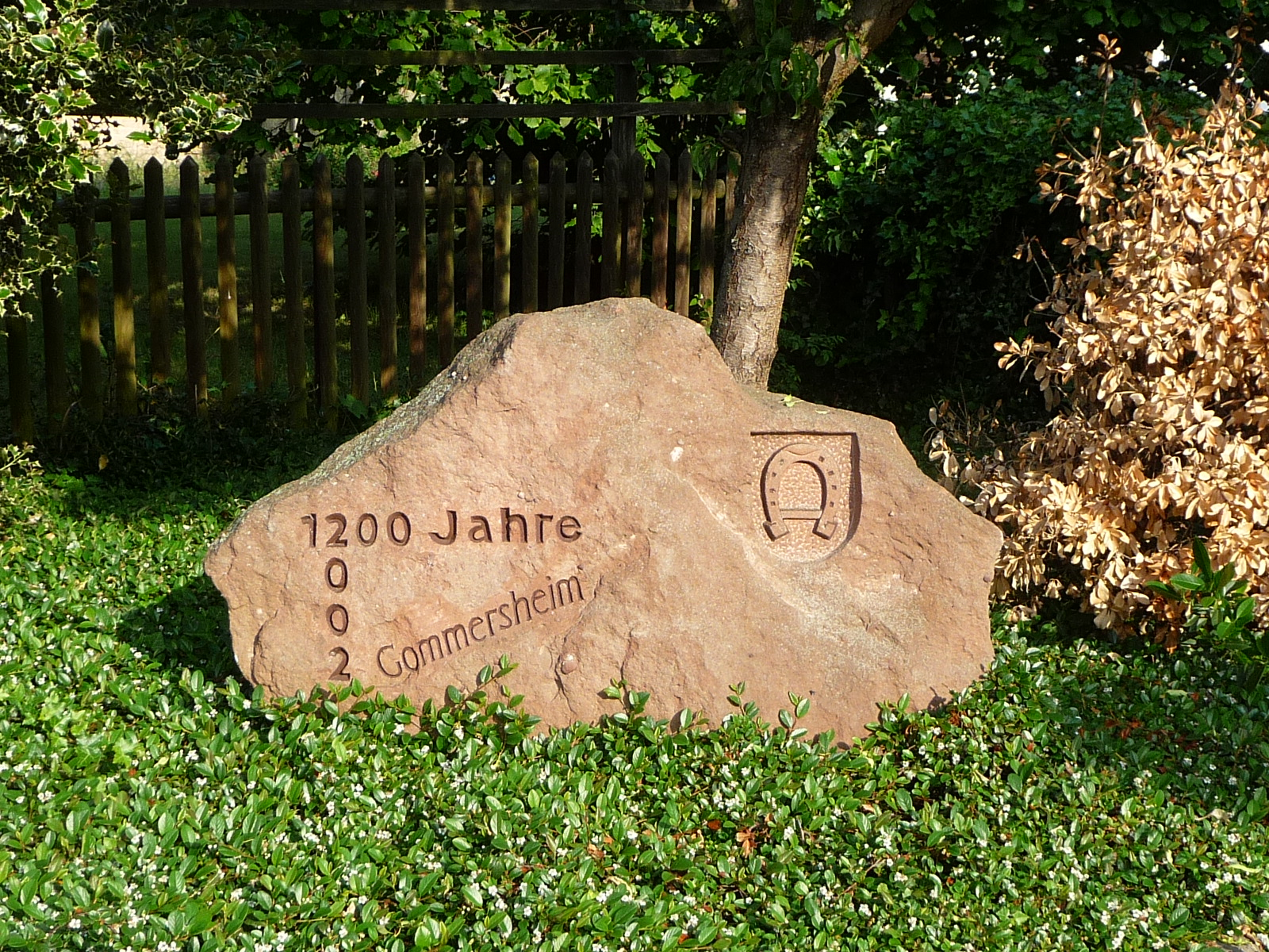 Gommersheim